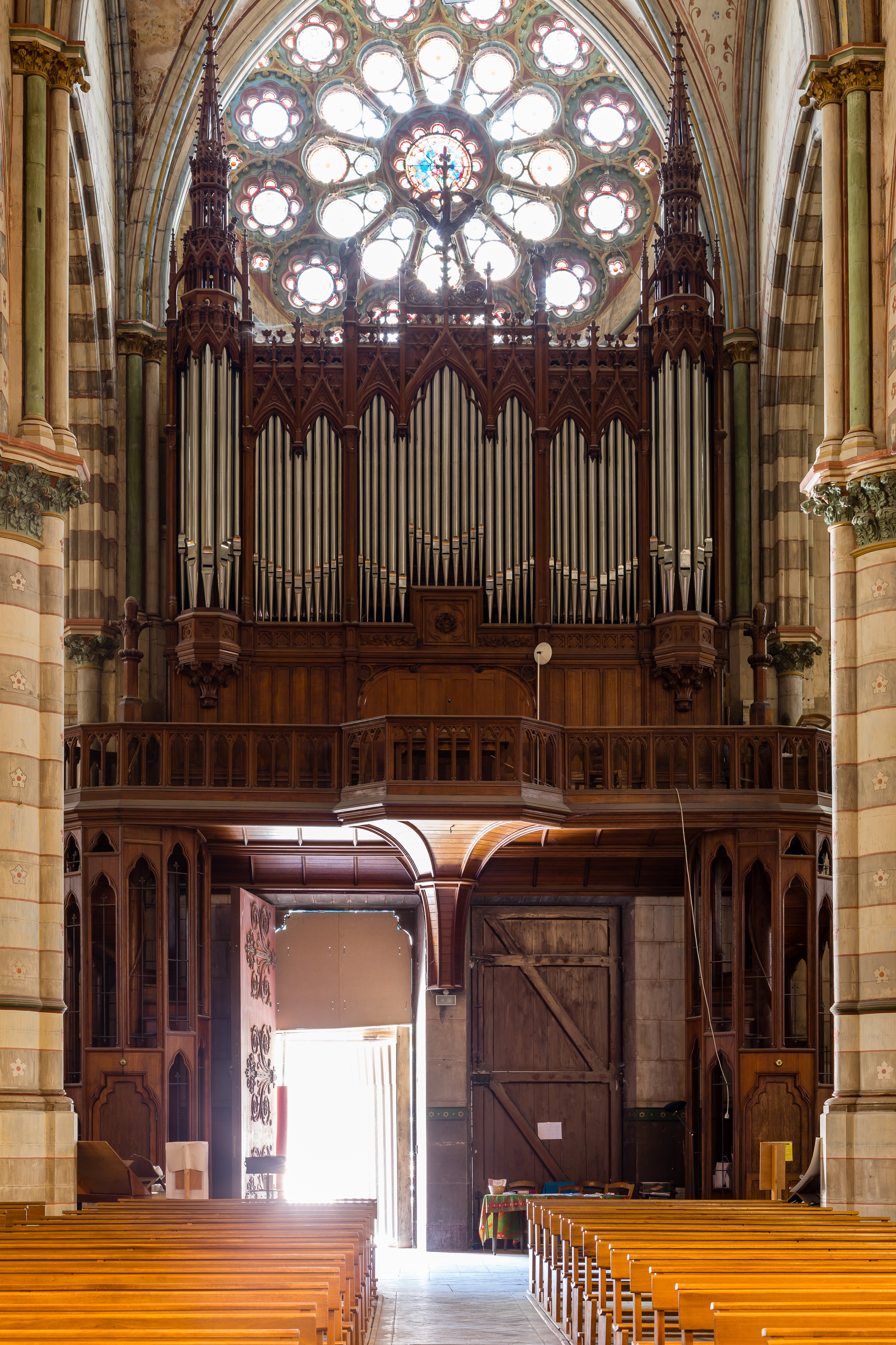 Orgue de tribune de la cathédrale Saint-Jérôme de Digne-les-Bains (Alpes-de-Haute-Provence, France).